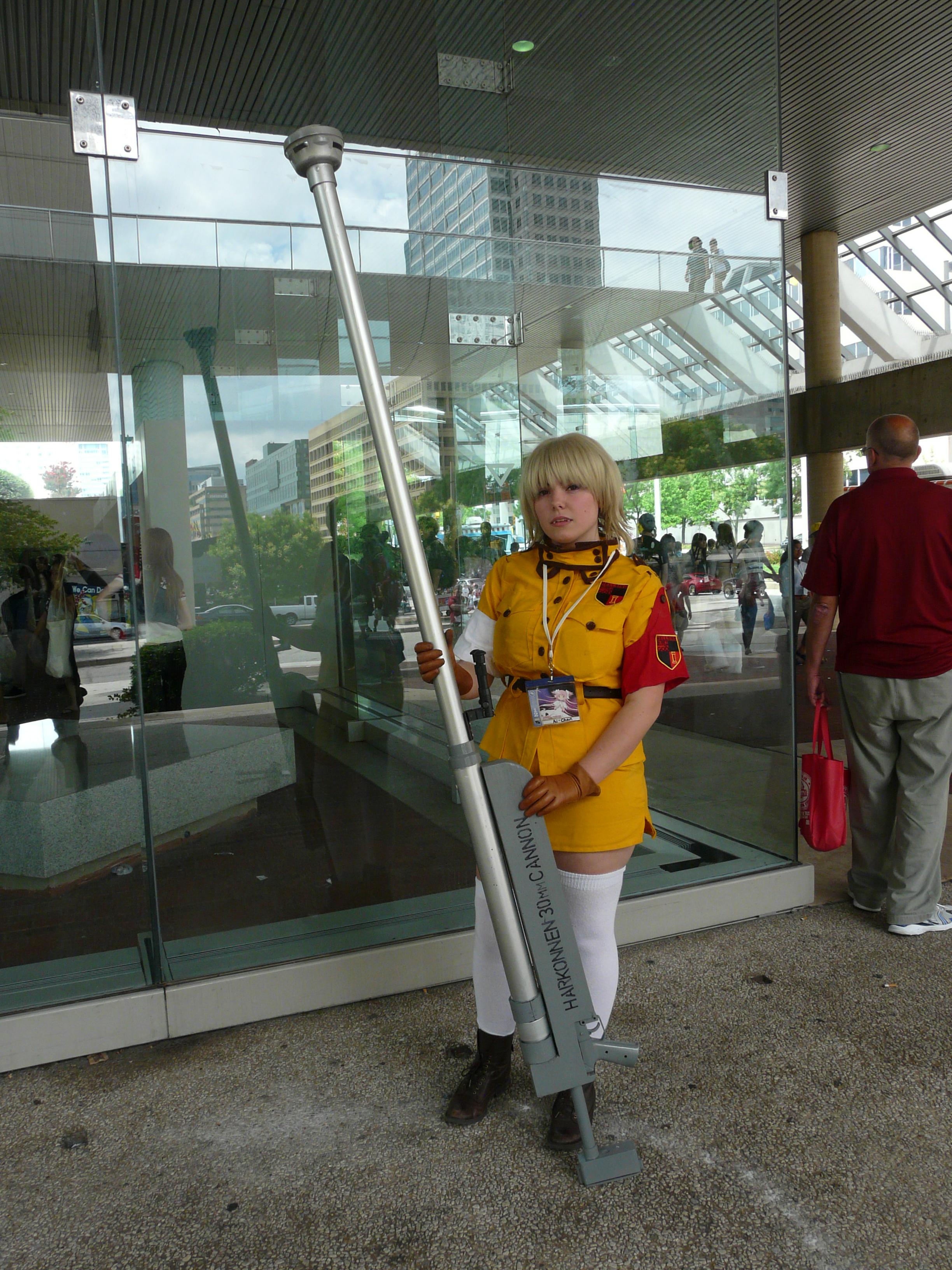 Otakon 2012 cosplay